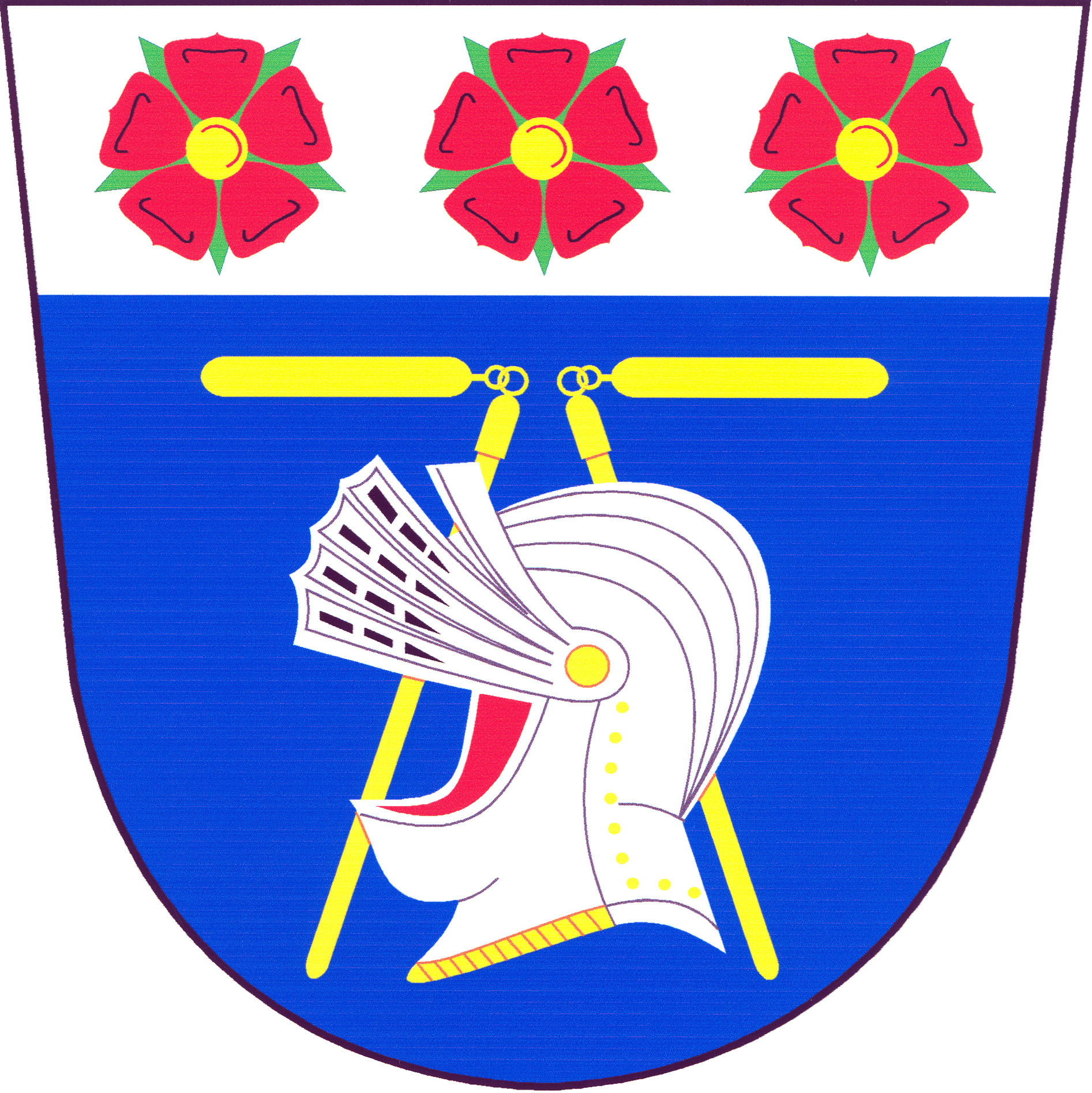 Znak obce Hejtmánkovice